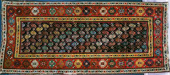 Qədim Gəncə xalçası, V&A muzeyi